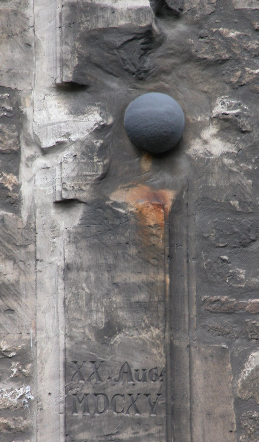 Braunschweig: Braunschweiger Dom: Kanonenkugel von 1615 in der Ostseite